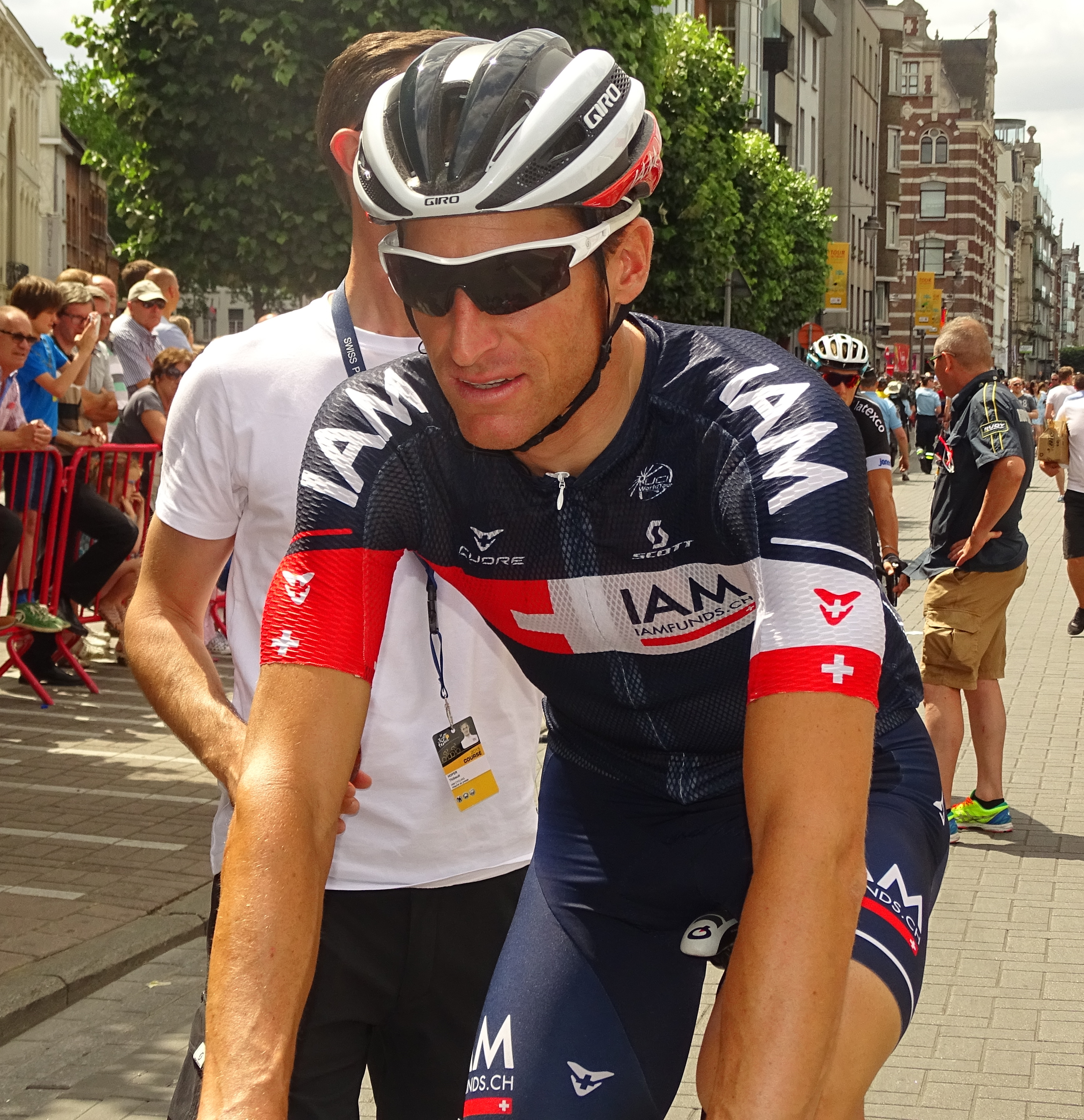 Reportage réalisé le lundi 6 juillet à l'occasion du départ de la troisième étape du Tour de France 2015 à Anvers, Belgique.